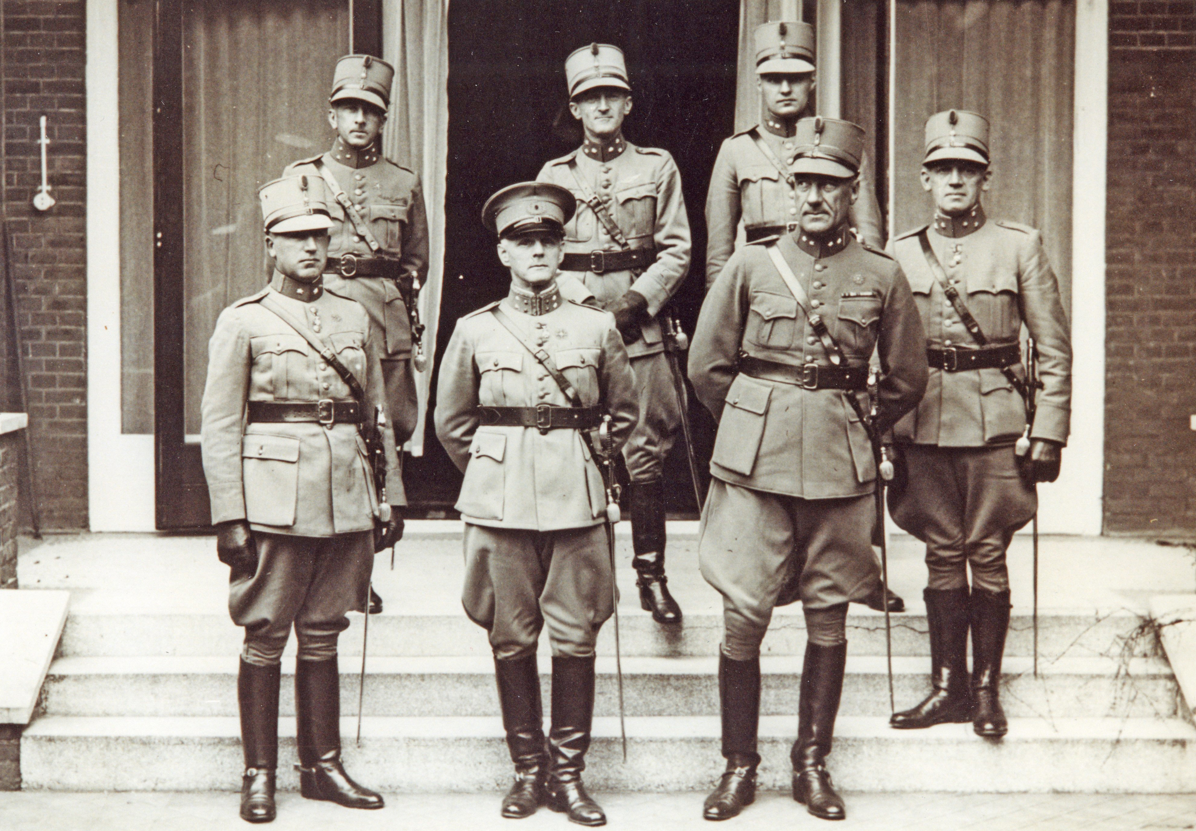 De nieuwe commandant van het Commando Luchtverdediging, generaal-majoor P.W. Best, omringd door zijn staf. Links van Best staat majoor J.H. Droste, rechts luitenant-kolonel V.E. Wilmar. Achter het drietal bevinden zich van links naar rechts: kapitein B.J.M. Koenen, kapitein P.J. de Broekert, 1e luitenant S.H. Hoogterp en kapitein A. den Hertog.